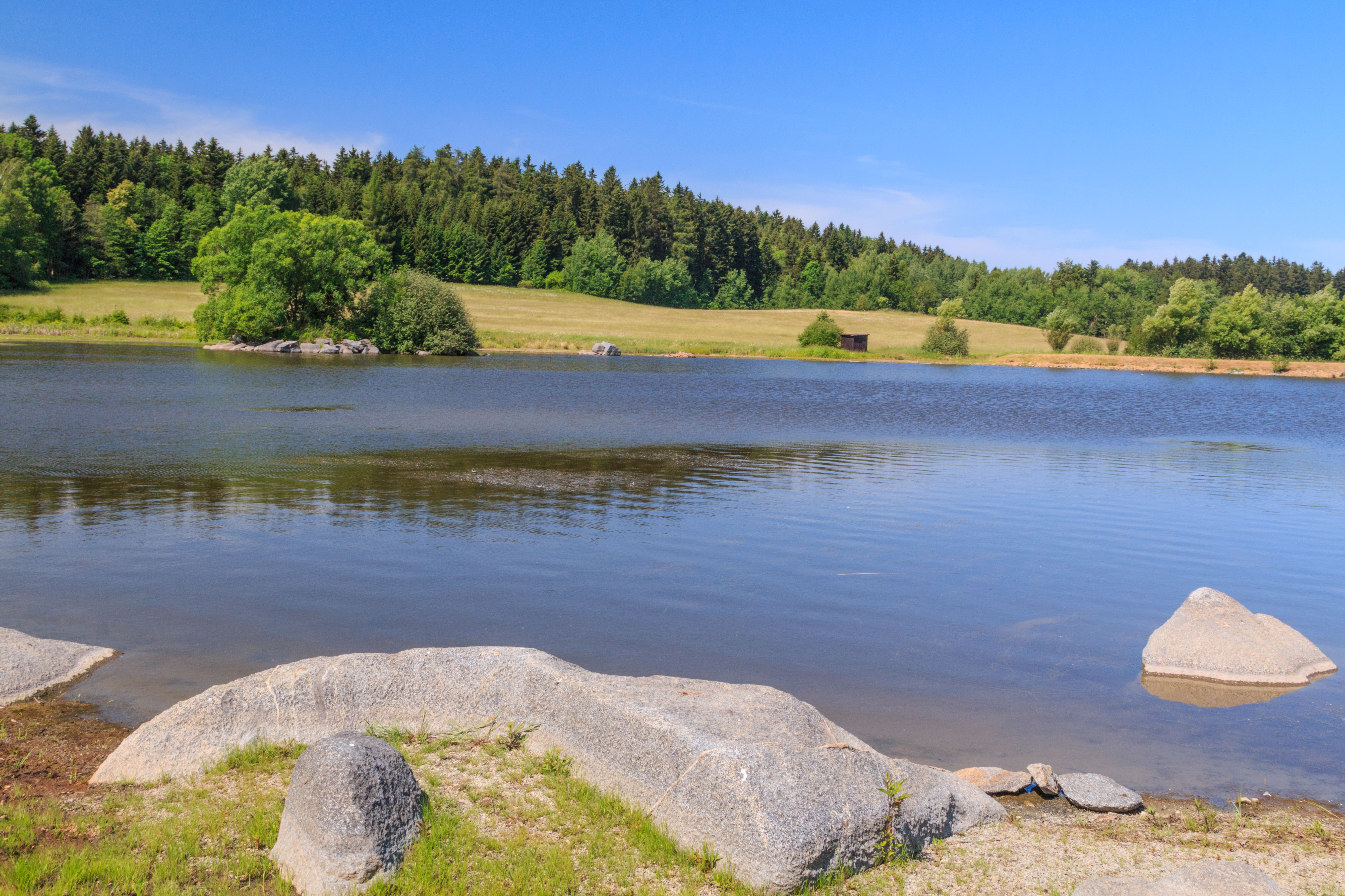 Skalní rybník u Dolní Jedlové Project: Vodstvo.